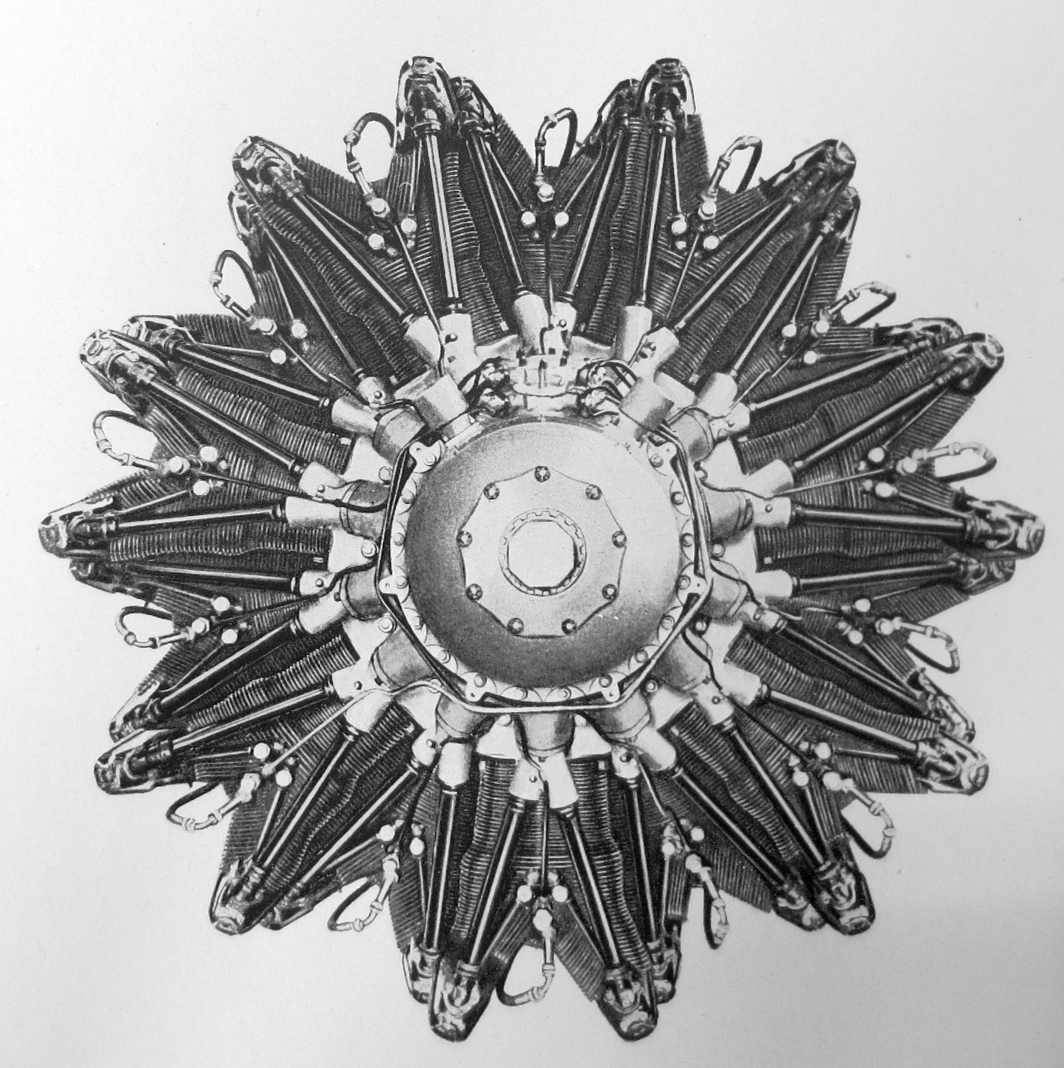 Walter Mistral K 14-II (1937-38), čtrnáctiválcový dvouřadý přeplňovaný vzduchem chlazený hvězdicový motor